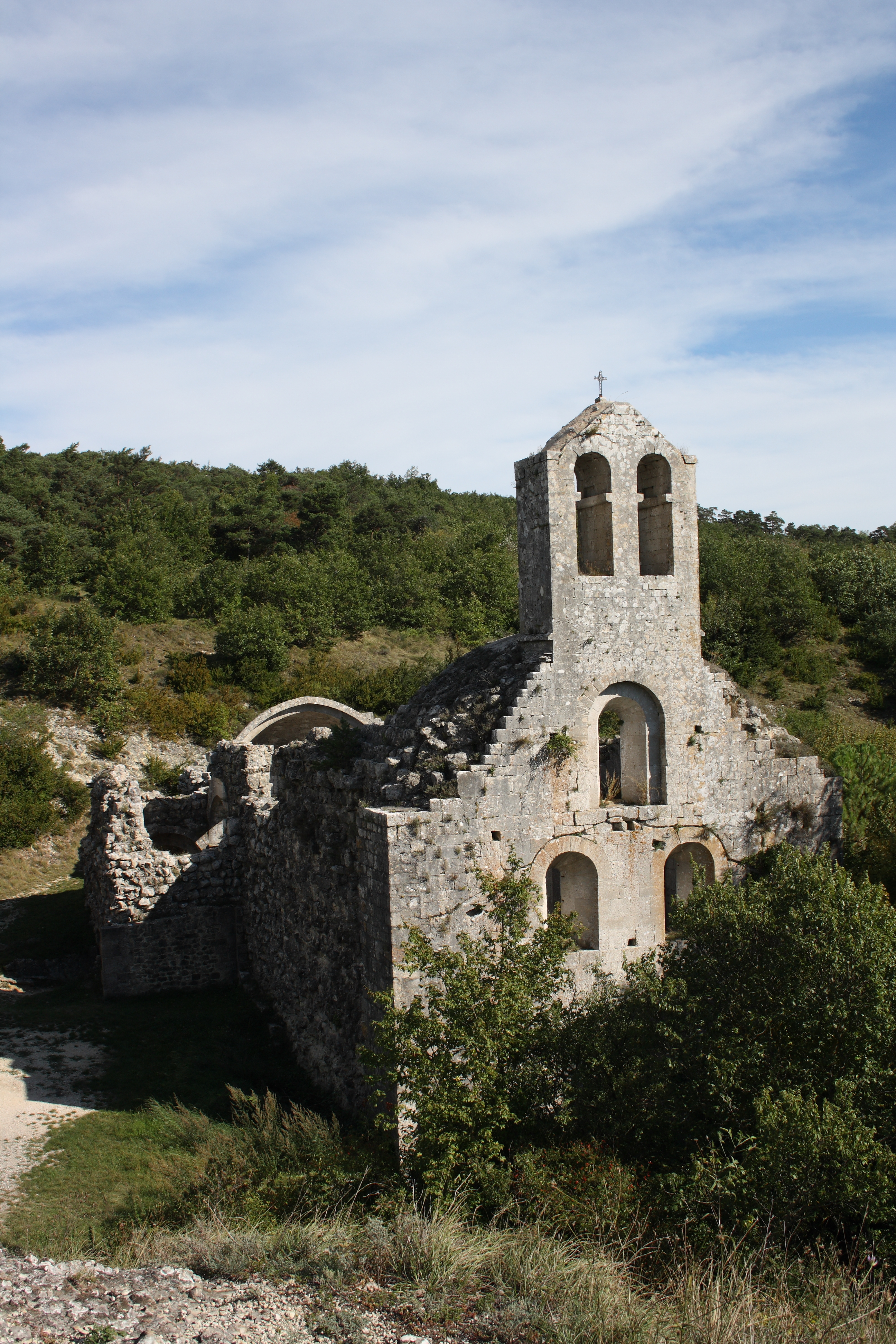 Ruine der Prioratskirche in Aleyrac